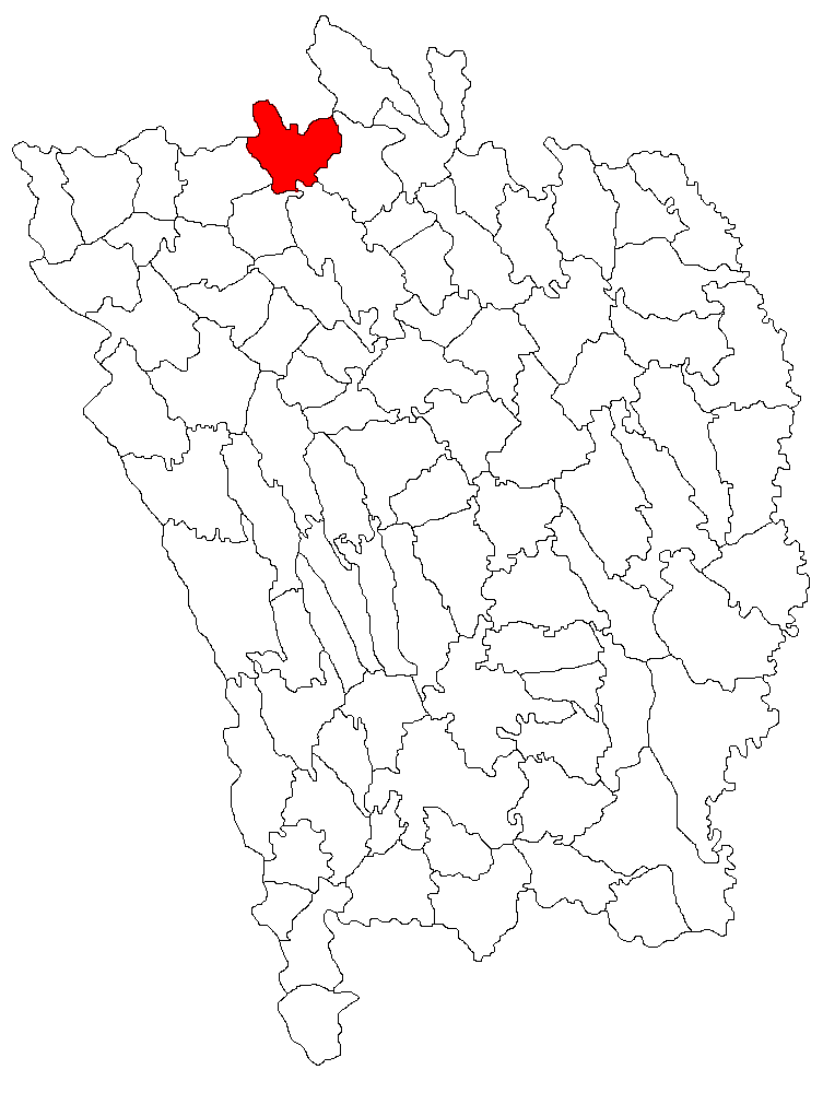 Categorie:Hărţi ale judeţului Vaslui